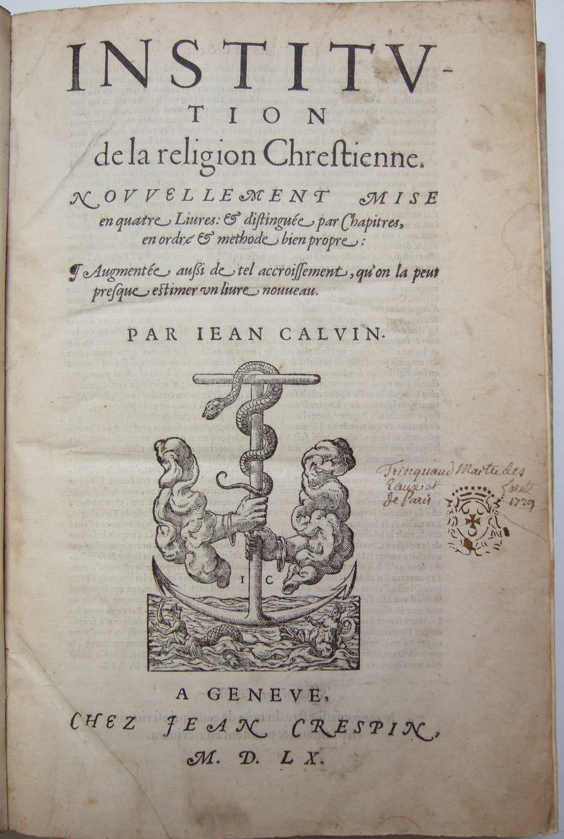 P16-531 titre